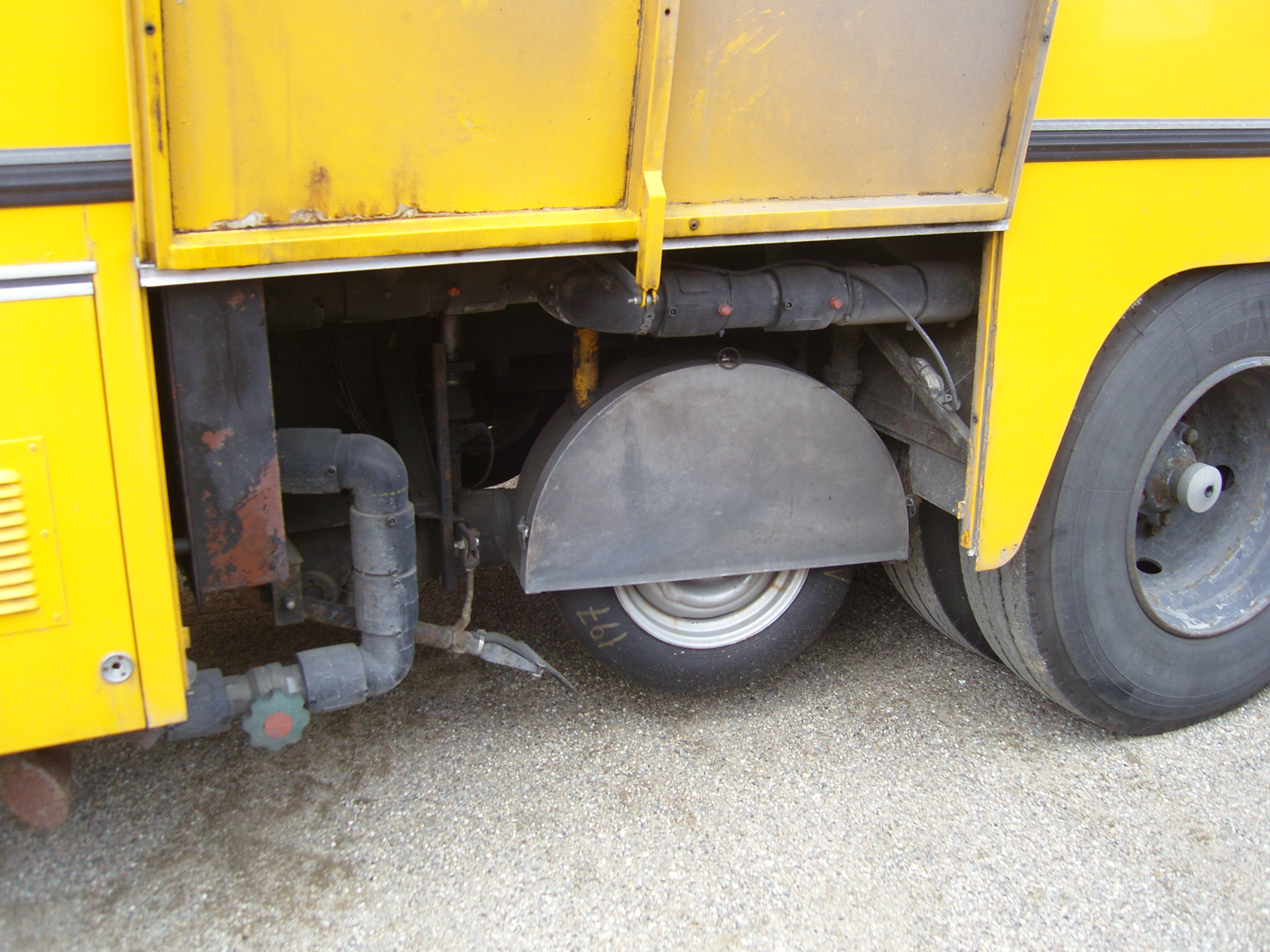 Målehjul til stradograf